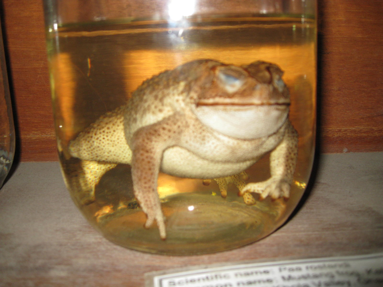 International Mountain Museum, Pokhara, Nepal.